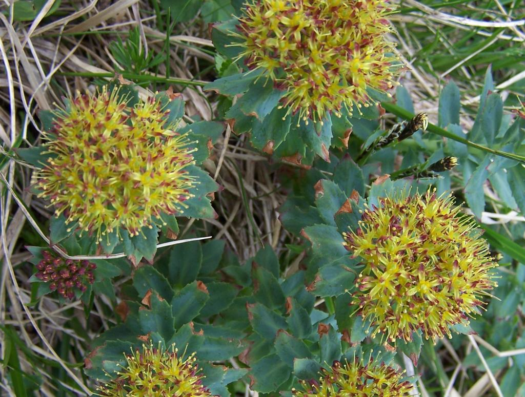 Rhodiola rosea (pl. różeniec górski), habitat: Tatra Mountains, Dolina Tomanowa